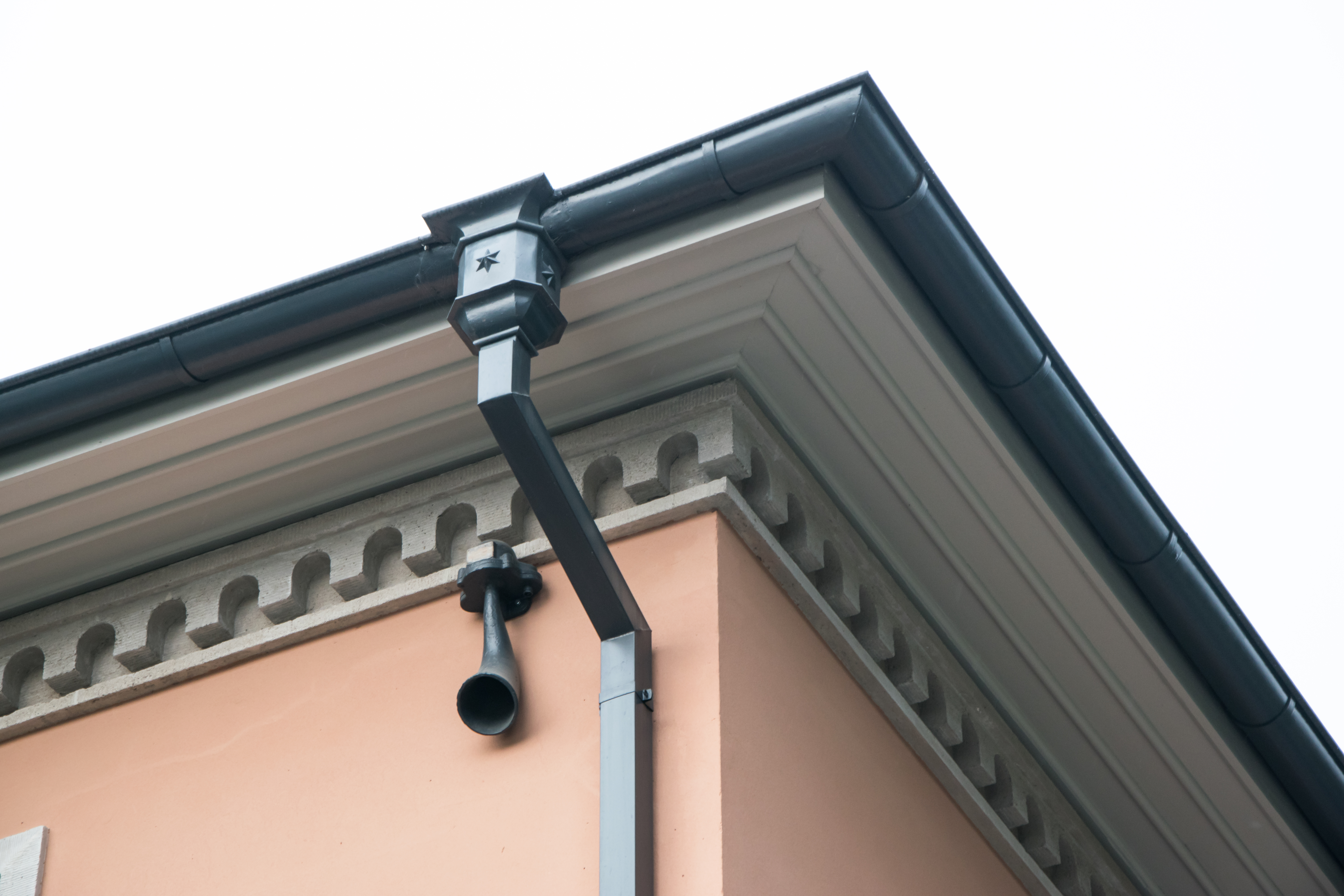 HH-Volksdorf Ohlendorffsche Villa Dachdetail mit Zahnschnittfries